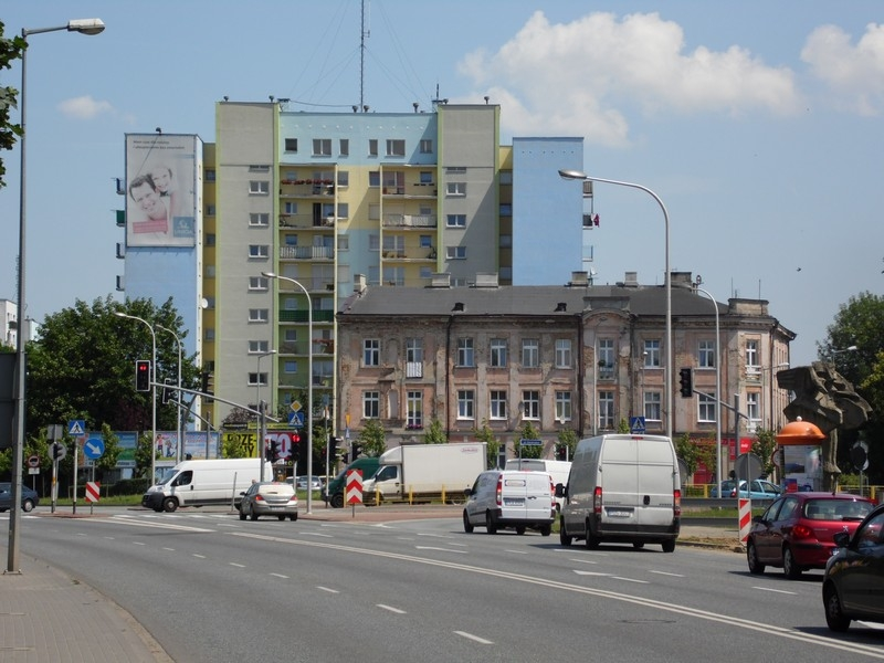 KALISZ W OBIEKTYWIE lipcowe obrazki 41